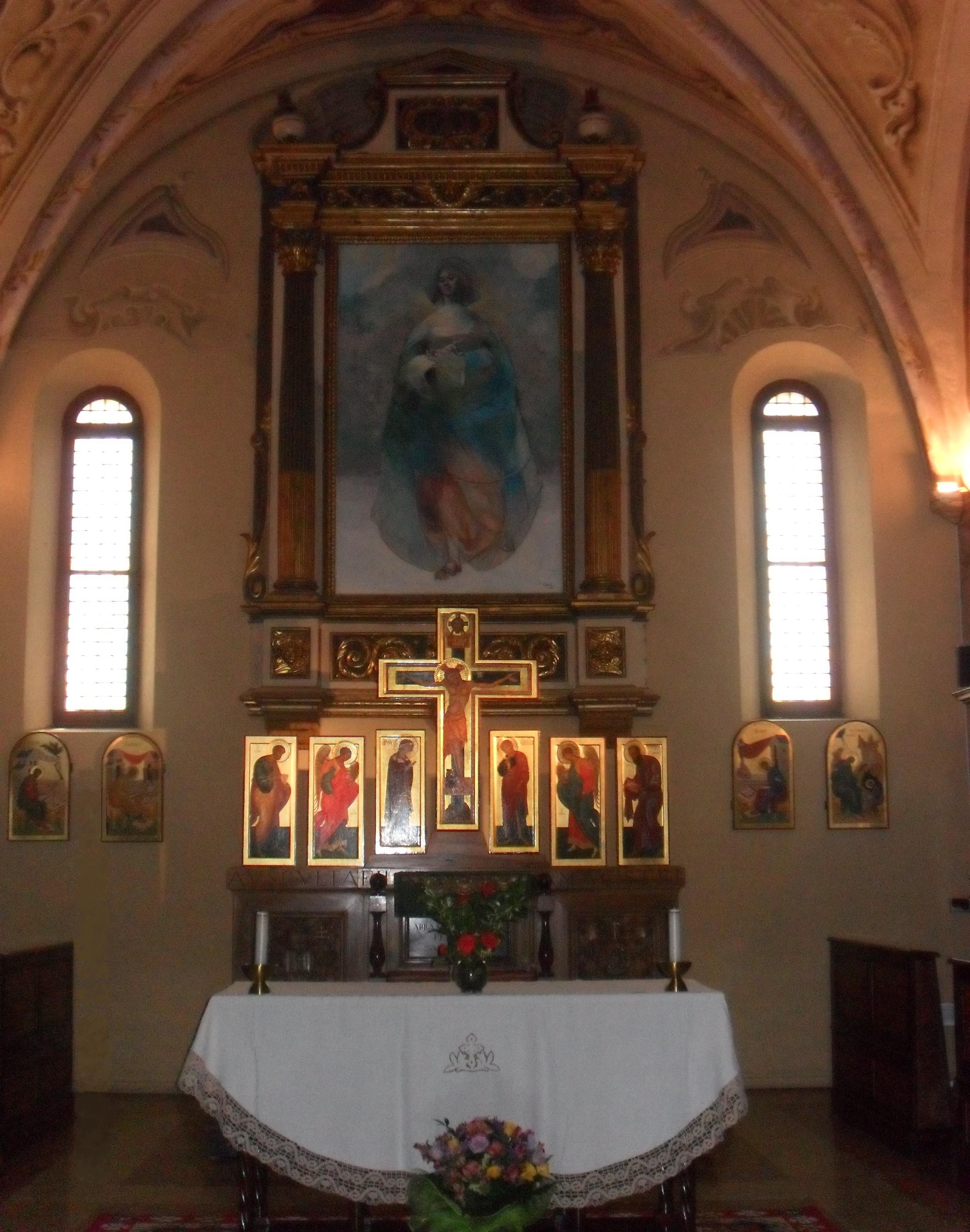 L'altare principale della chiesa della Badia di Torrechiara.